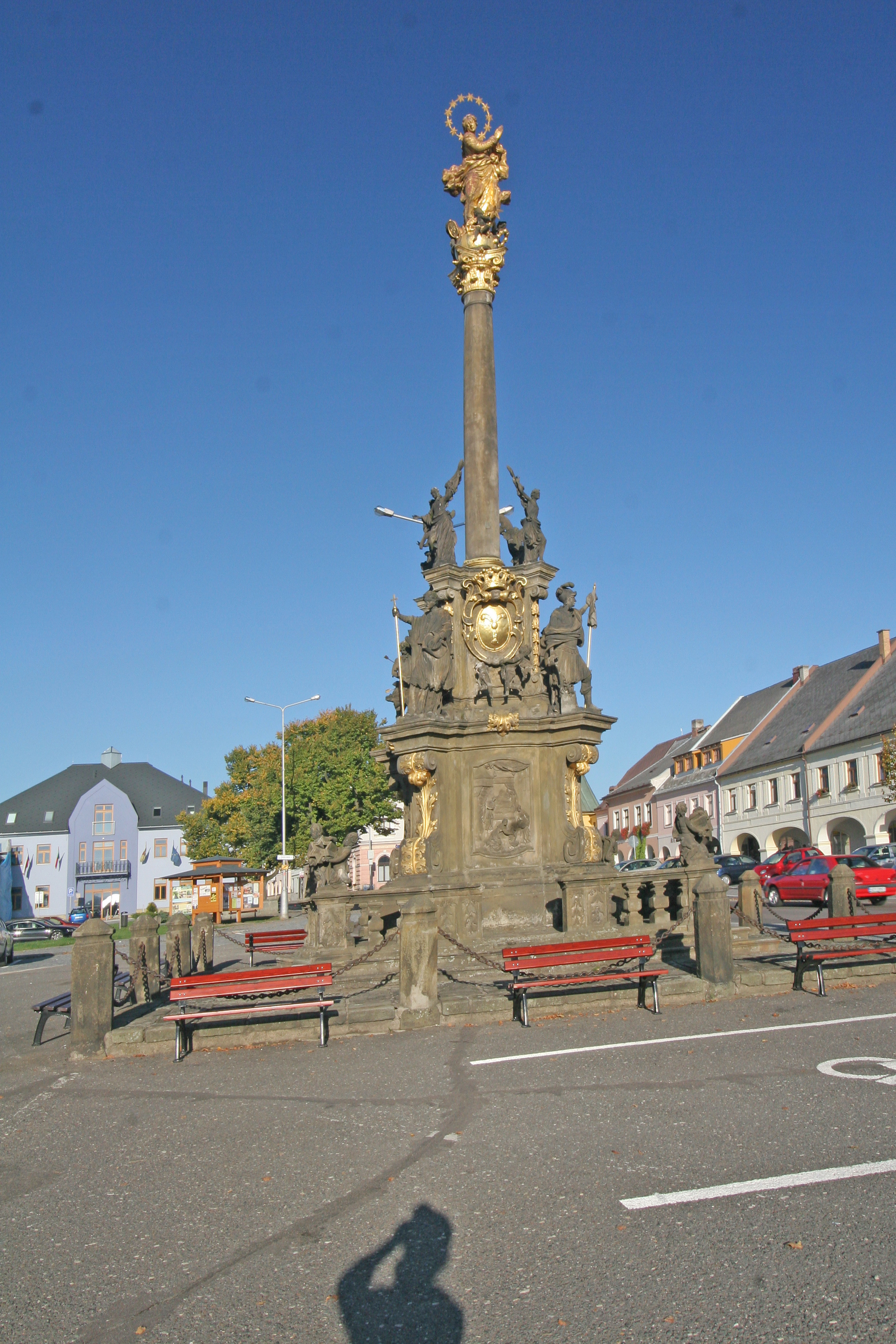 Morový sloup, sousoší Panny Marie, Václavské náměstí, Letohrad